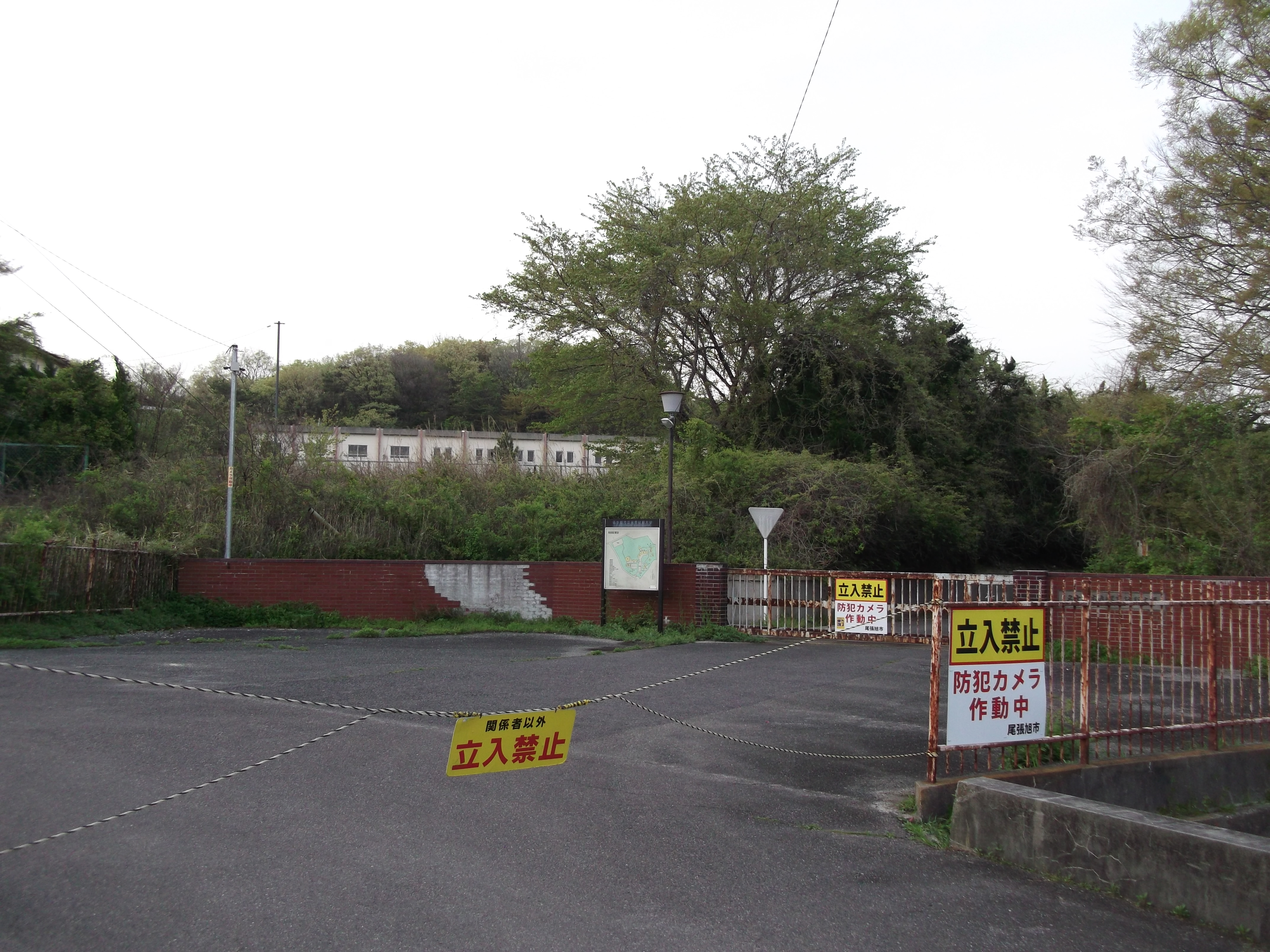 愛知県尾張旭市平子町北の名古屋市立保育短期大学跡地入口を南側公道より撮影